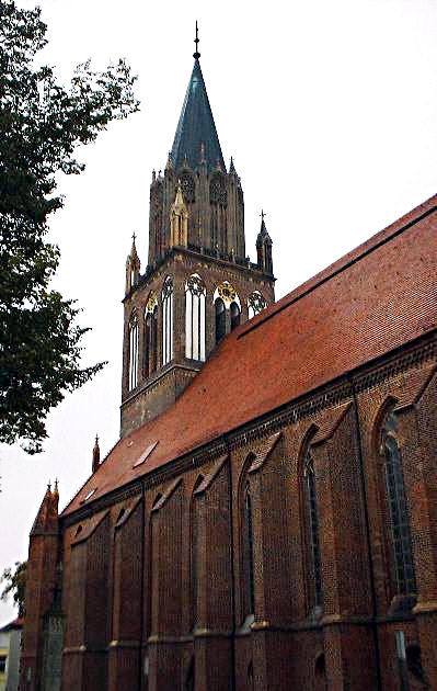 die Konzertkirche in Neubrandenburg